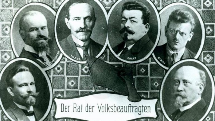 Члены первого состава Совета народных уполномоченных (Германия)